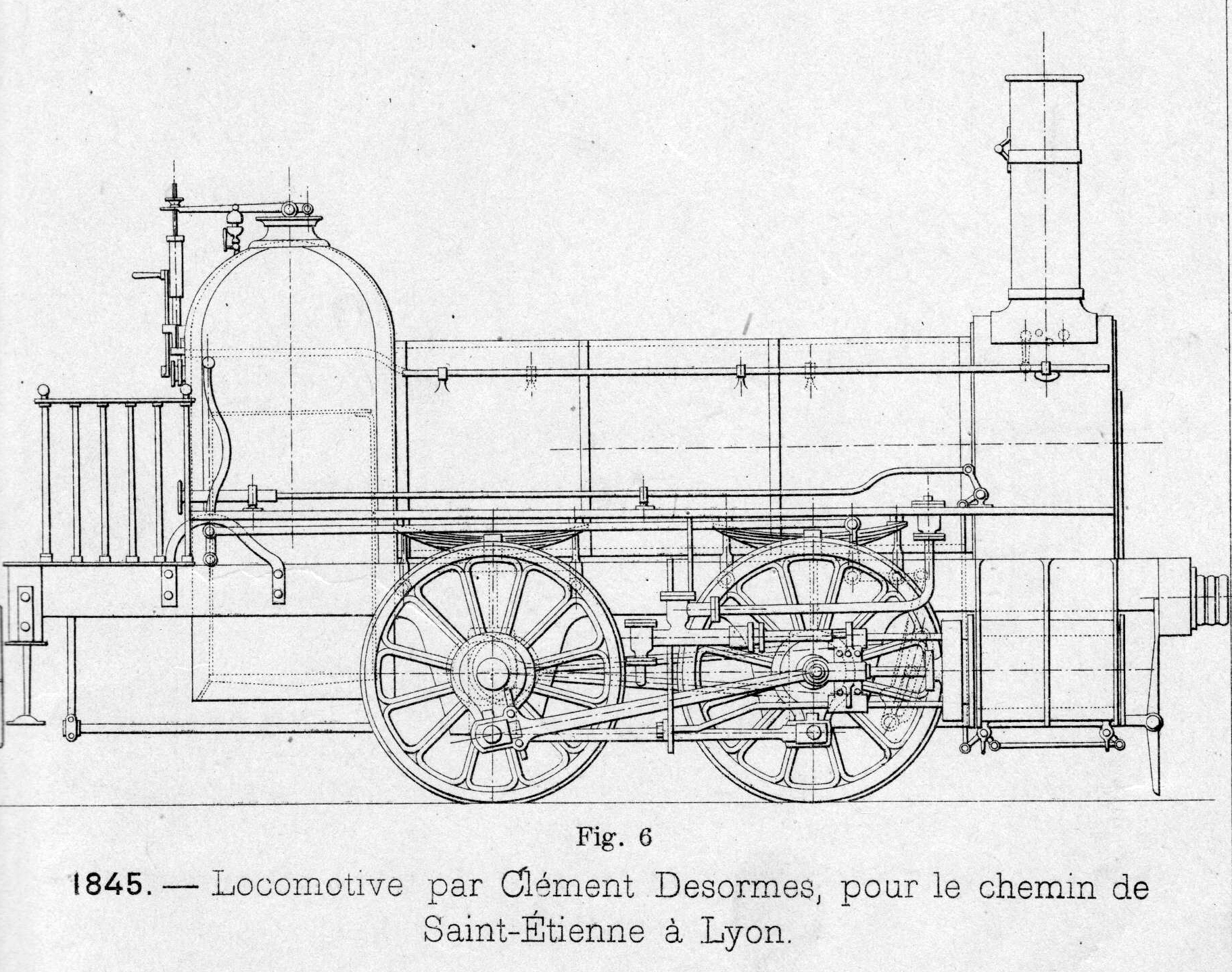 schéma